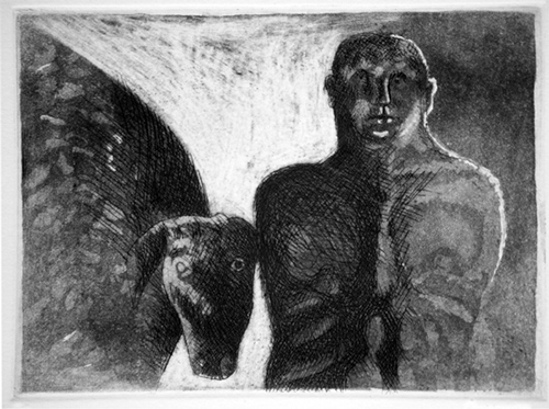 Print